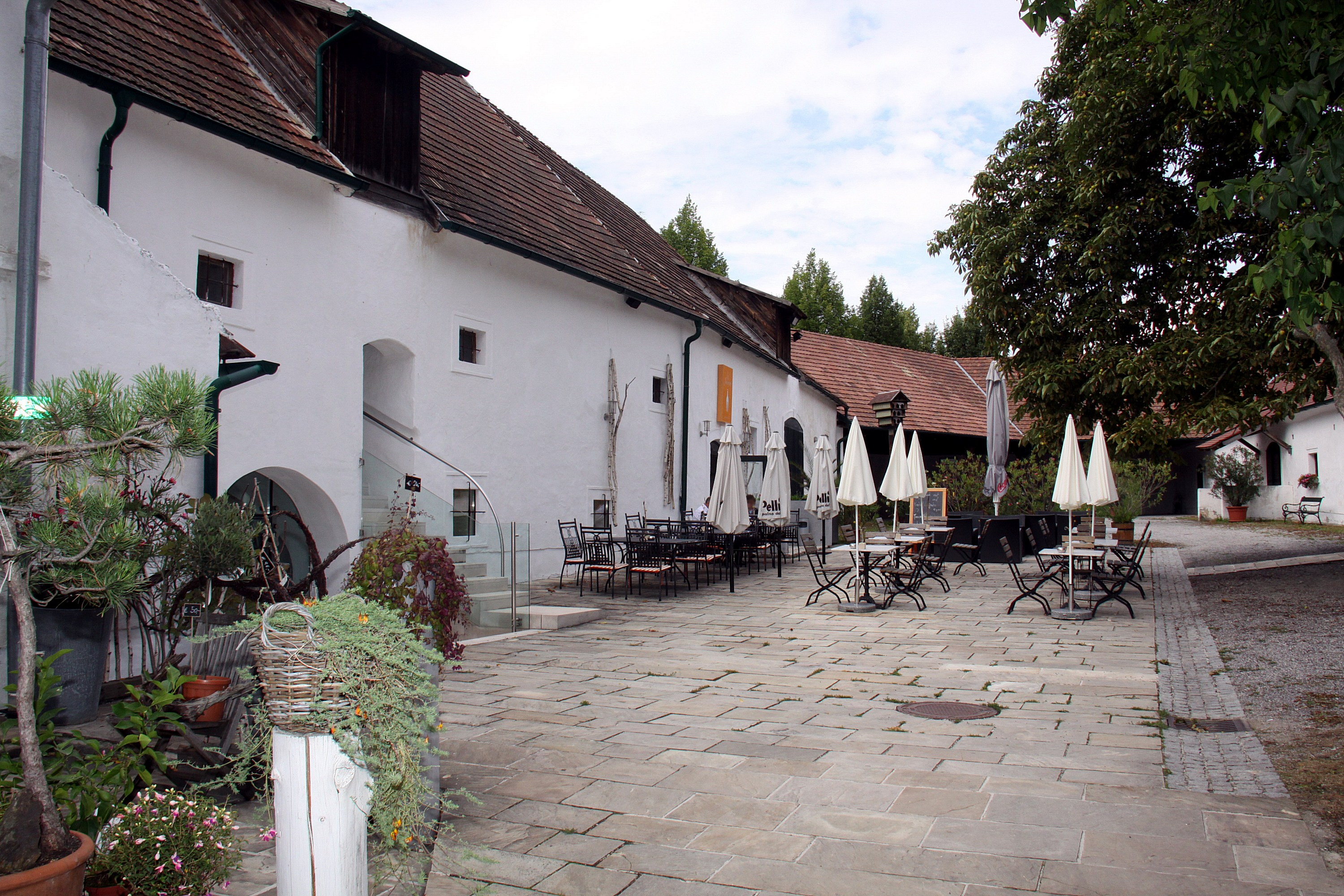 Denkmalgeschützter ehemaliger Meierhof (heute Awarenkeller) in Pöttsching.